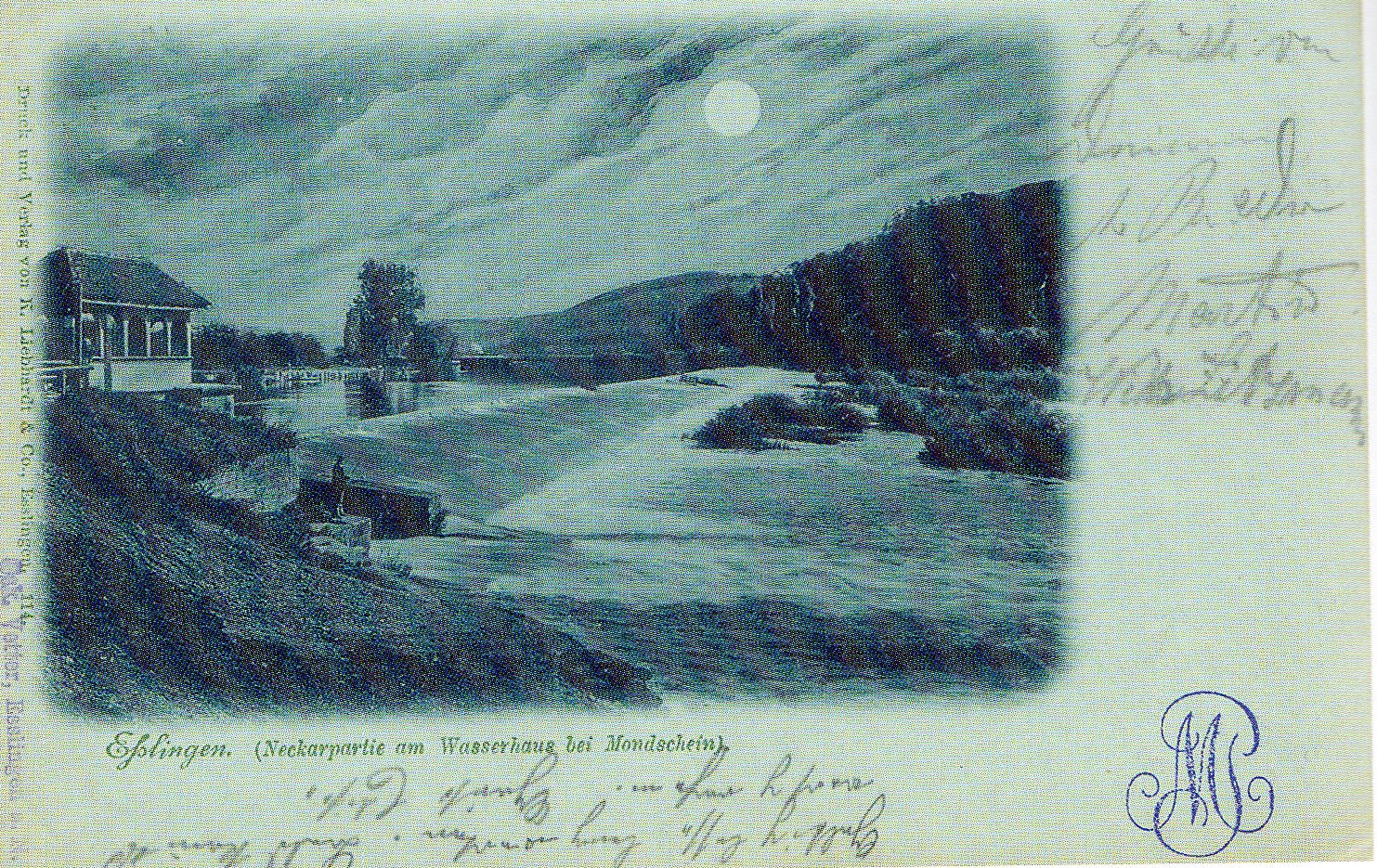 Partie am Wasserhaus in Esslingen bei Mondschein